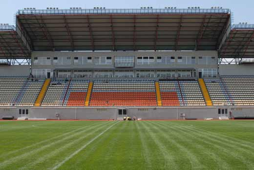 Slavutych Arena